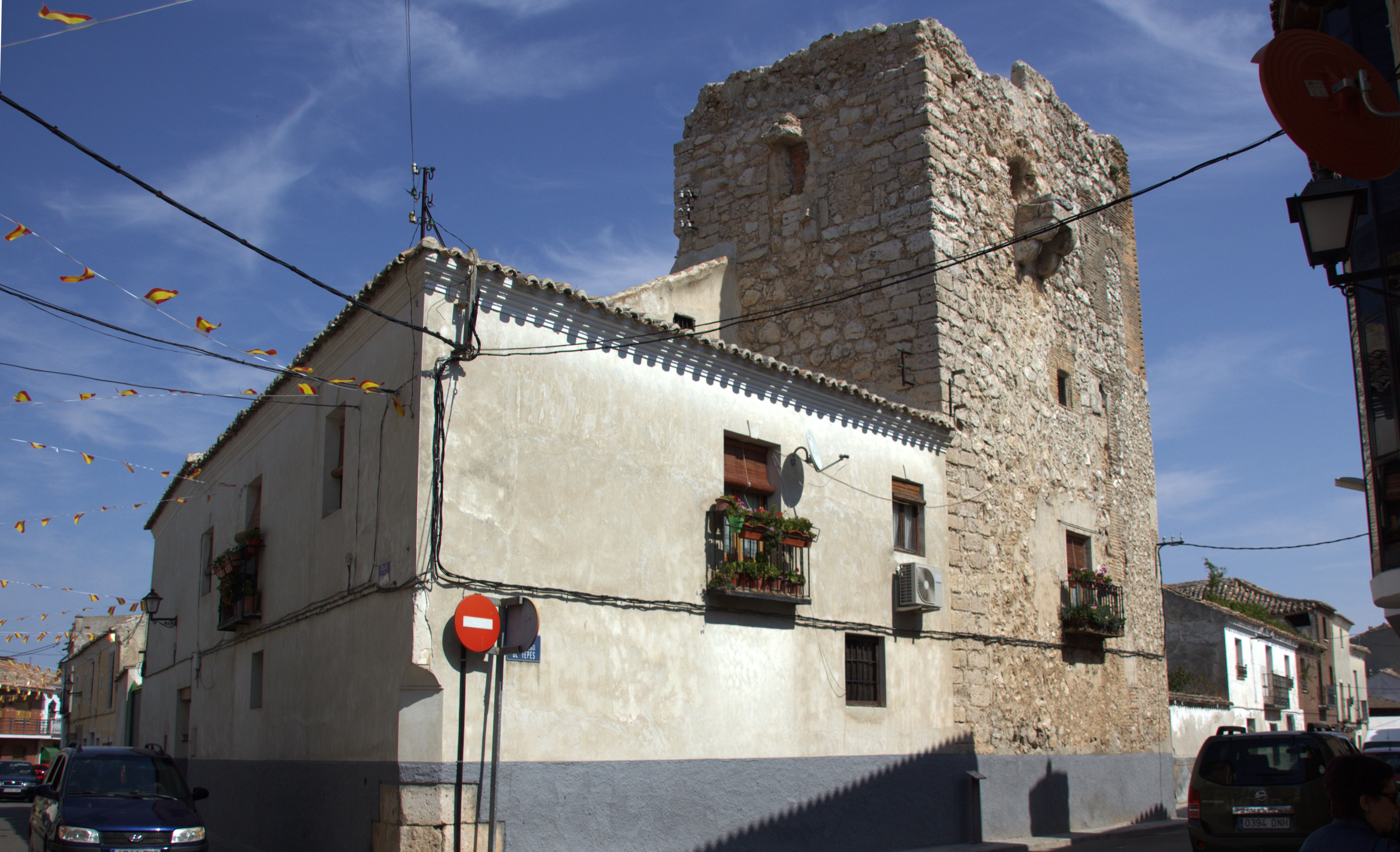 Yepes, provincia de Toledo (España).